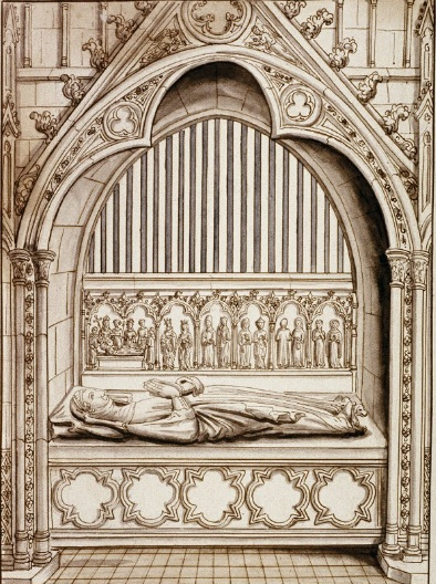 Adèle de Vermandois, d. 975